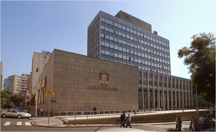 Palácio Farroupilha, sede da Assembléia Legislativa do estado do Rio Grande do Sul. Porto Alegre, Brasil.